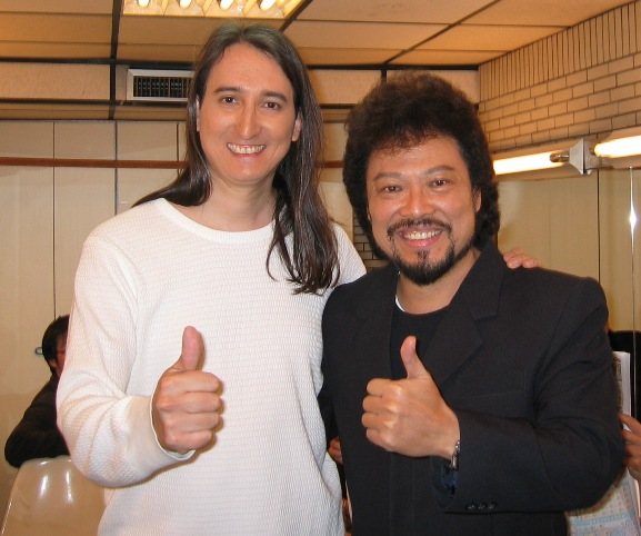 龍笛於2004亞洲巡迴演出參加中國電視公司綜藝節目《綜藝大哥大》訪問，與主持人張菲合影。